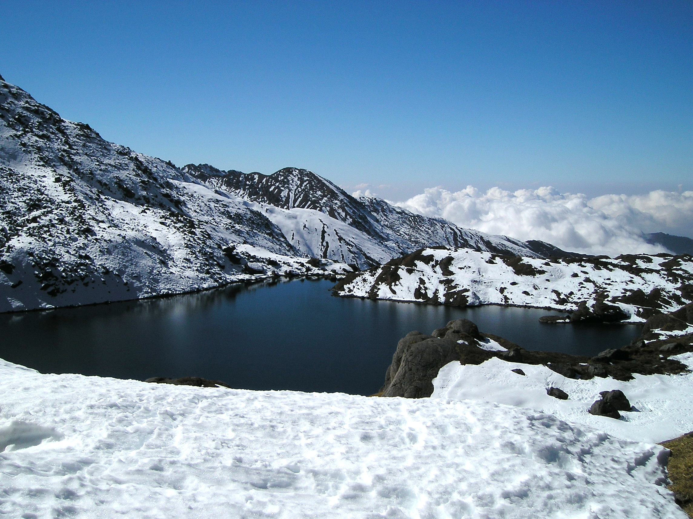 Himalya Lakes, Gosainkund, Nepal. 4350 m'